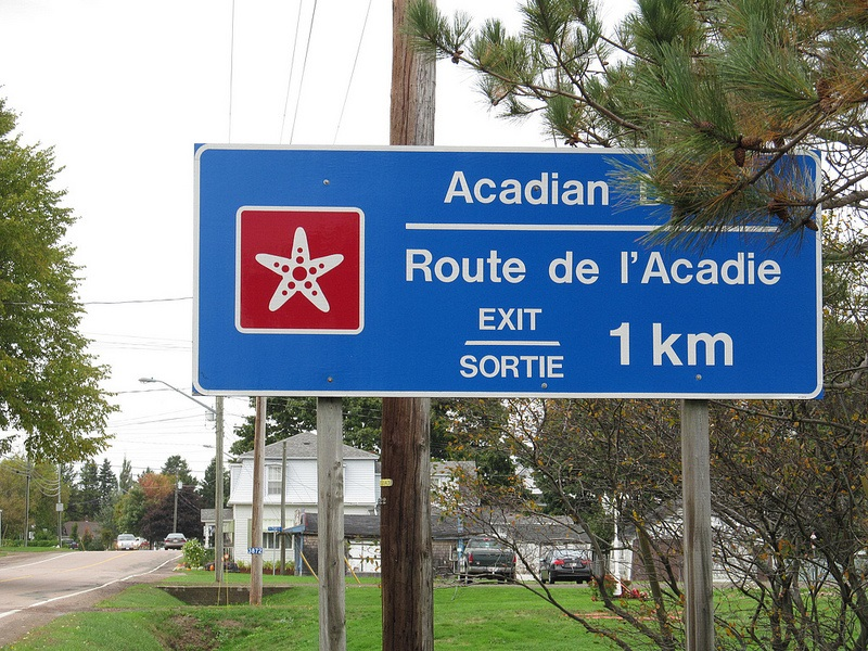 Panneau routier bilingue indiquant la route de l'Acadie au Nouveau-Brunswick.